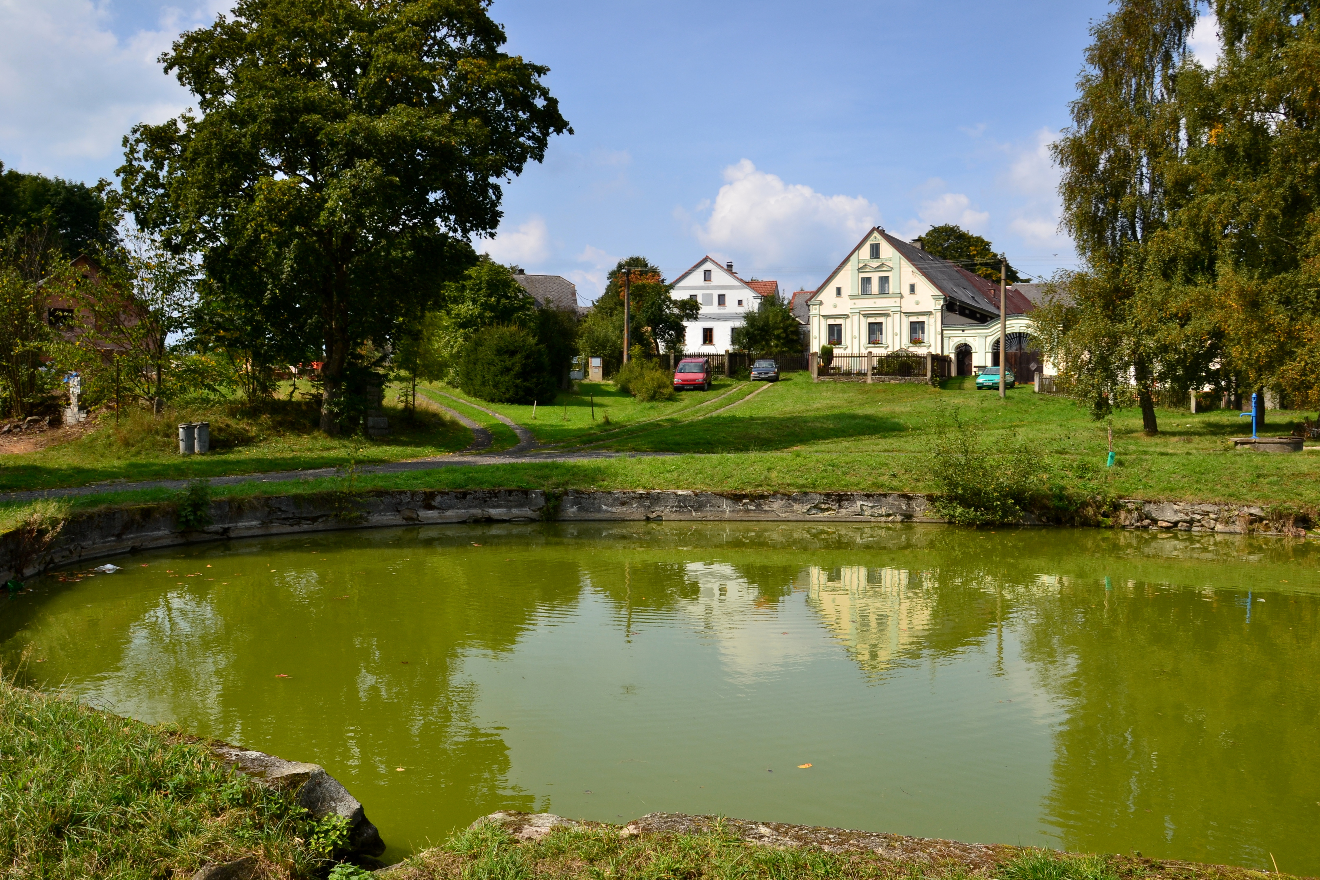 Návesní rybník s památkově chráněnou usedlostí čp. 2